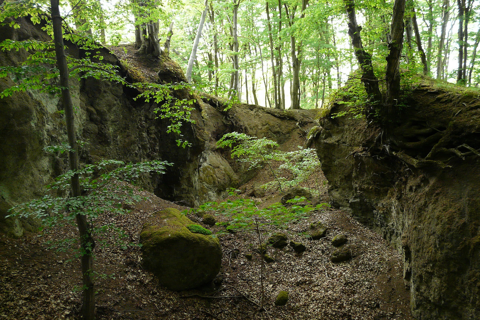 Starý lom čediče na Jezovské hoře